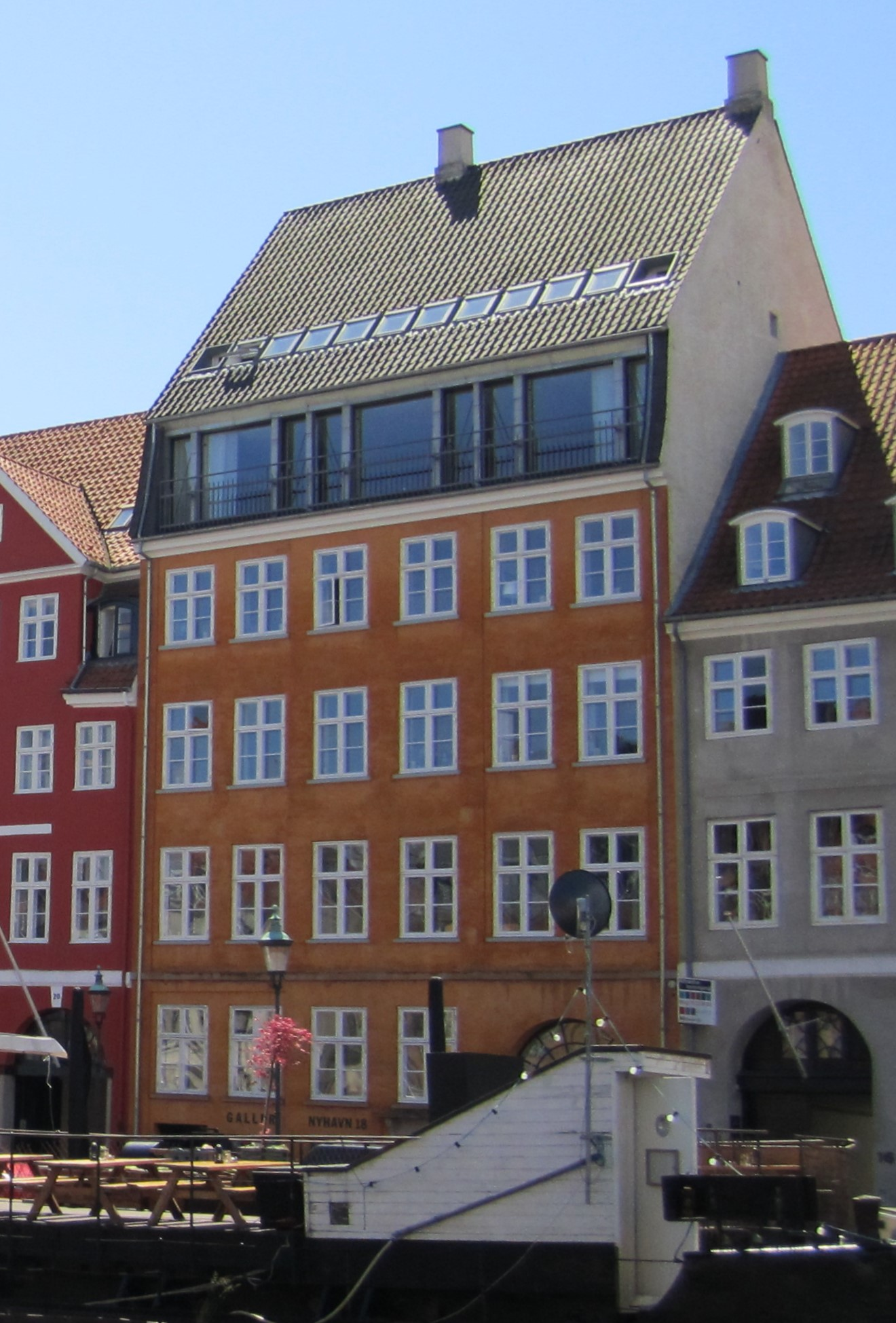 Nyhavn 18 in Copenhagen, Denmark